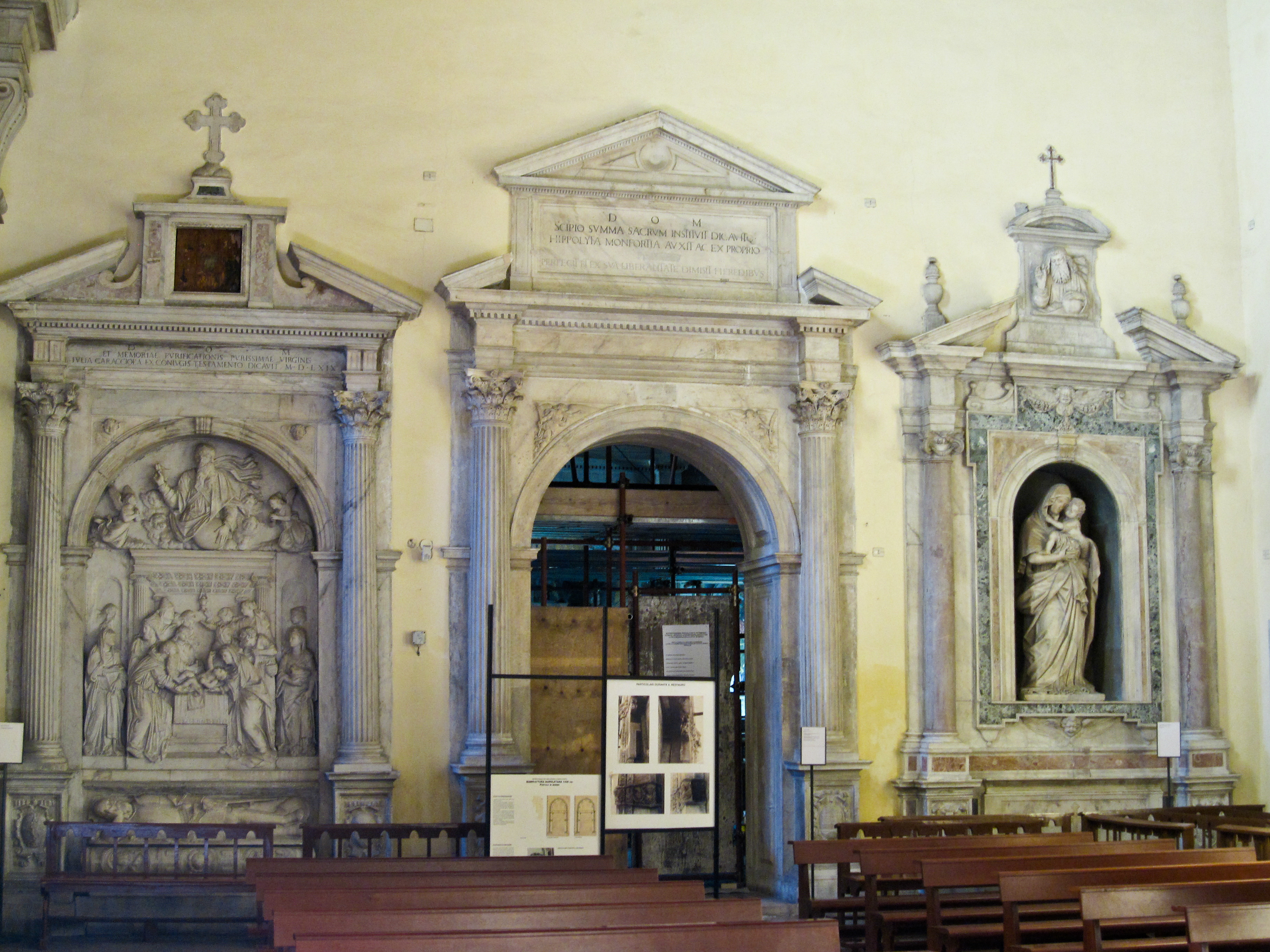 L'interno (Particolare) Chiesa di San Giovanni a Carbonara - Napoli